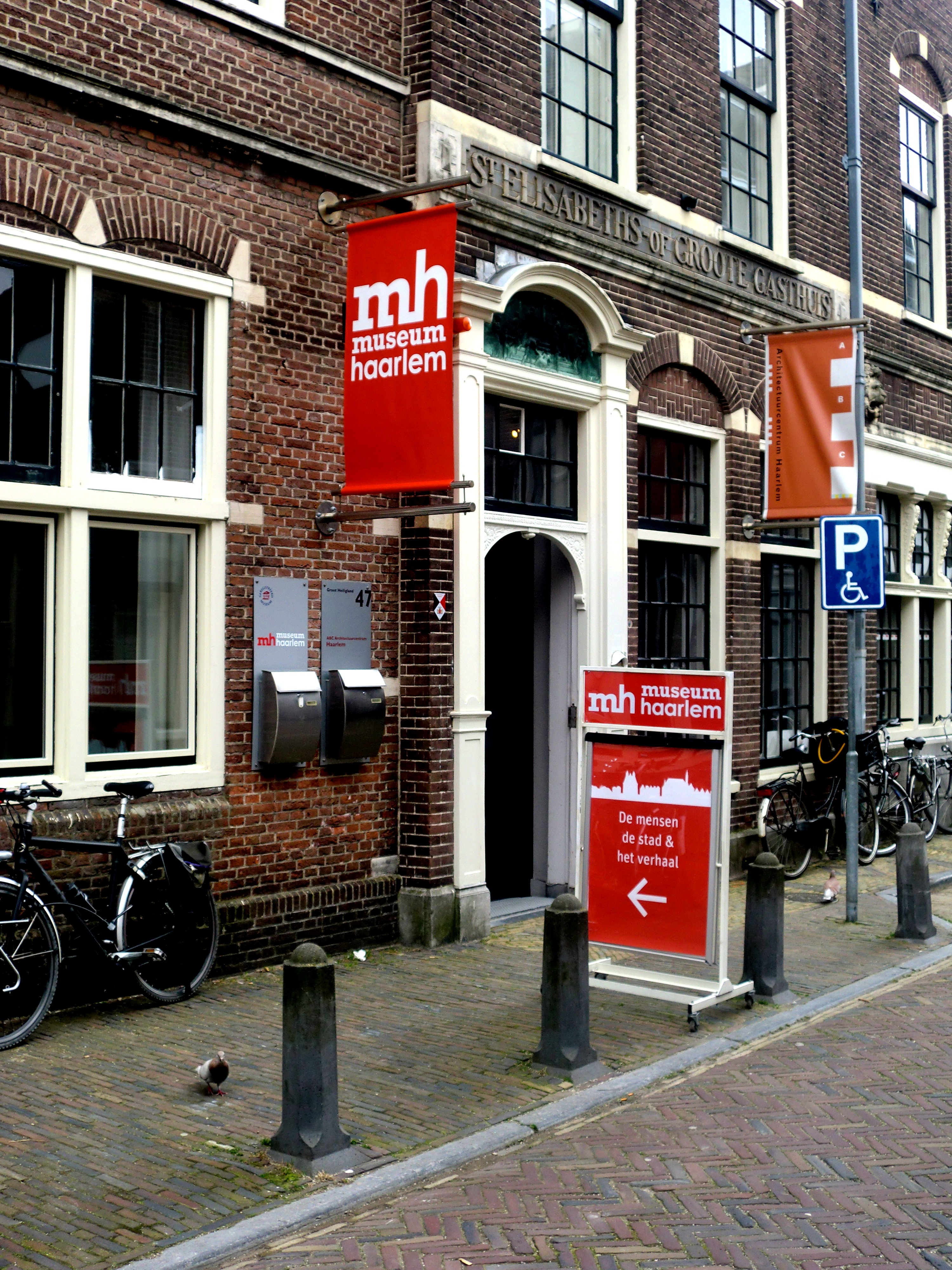 Entree Museum Haarlem